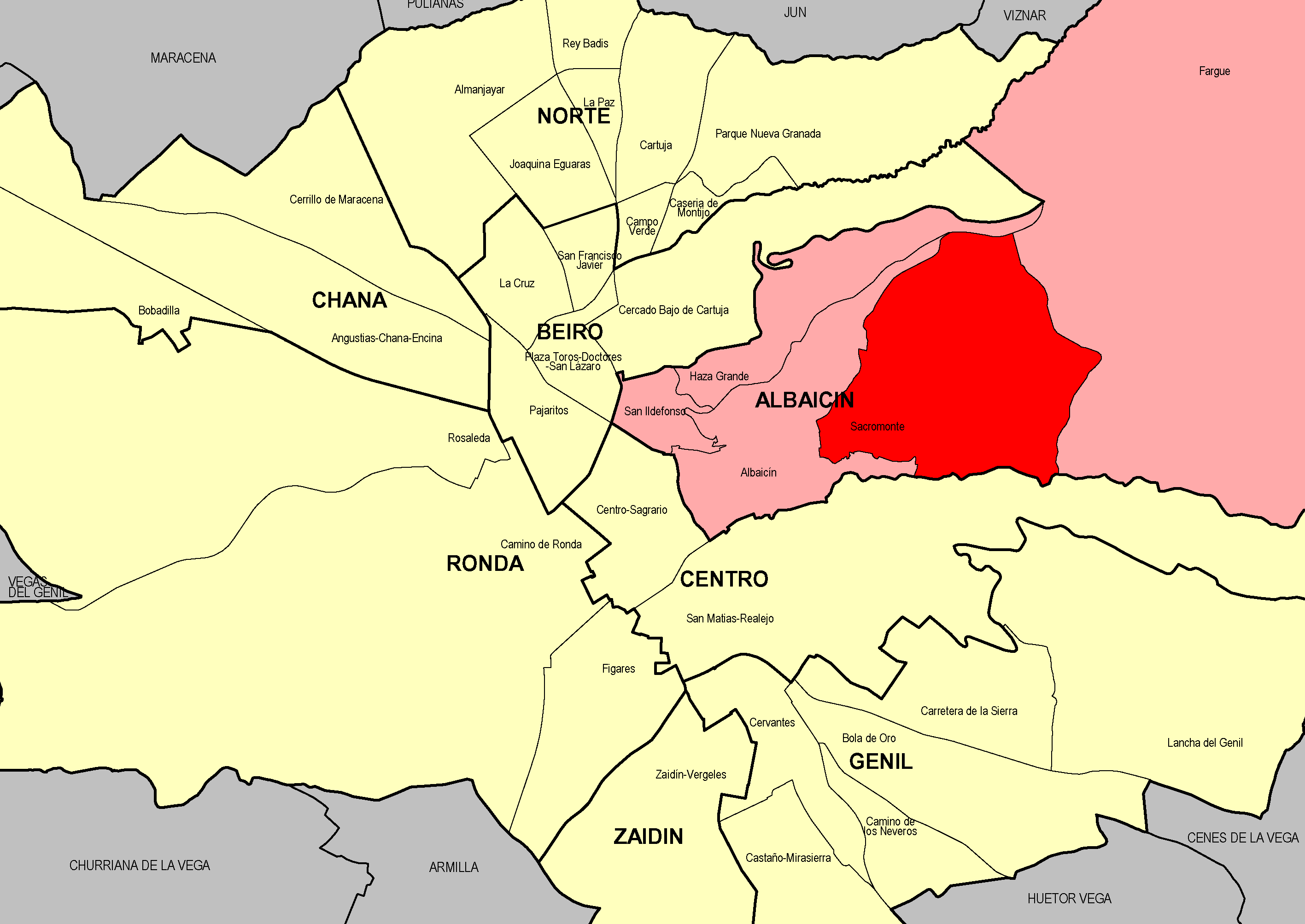 Barrio Sacromonte, en el distrito Albaicín (ciudad de Granada, España)